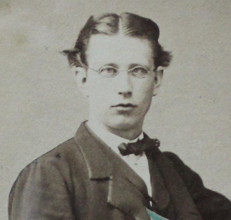 Porträtfotografie des späteren Historikers und Bibliothekars Otto Gilbert (1839–1911).